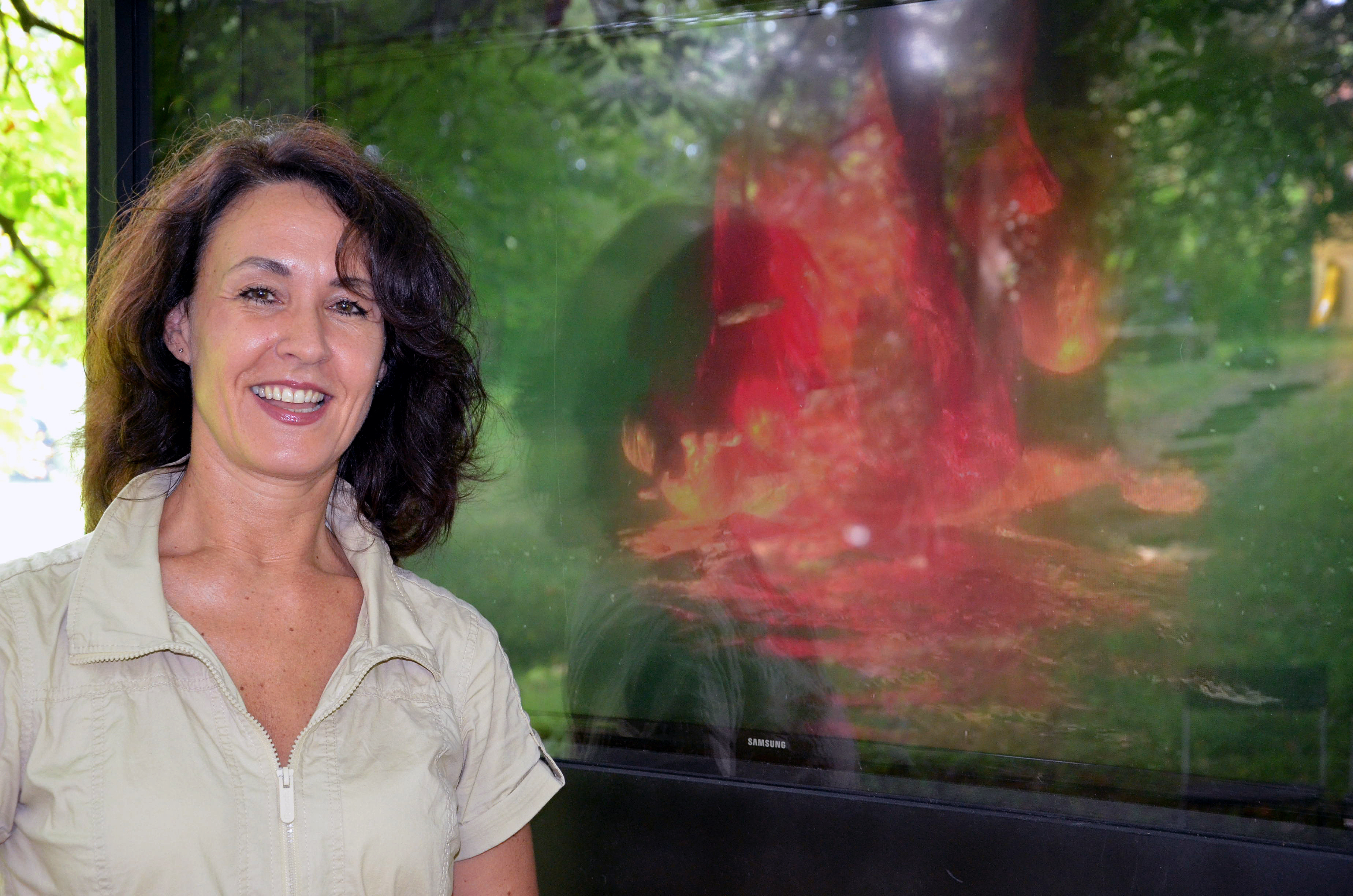 Während der Pressekonferenz zur Freiluft-Ausstellung WasserKunst: Zwischen Deich und Teich im August 2013 in der historischen Parkanlage vom Edelhof Ricklingen in Hannover posiert die Künstlerin Susanne Hoffmann auf Wunsch der Fotografen vor ihrer Video-Arbeit timeless. Für die gewünschte Kombination aus Porträt und Werk brachten Blitzlicht-Aufnahmen wie diese (aufgrund der hohen Kontraste bei strahlendem Sonnenschein und der Verschattung unter einem uralten Baum, unter dem der Bildschirm installiert wurde) halbwegs zufriedenstellende Ergebnisse ...